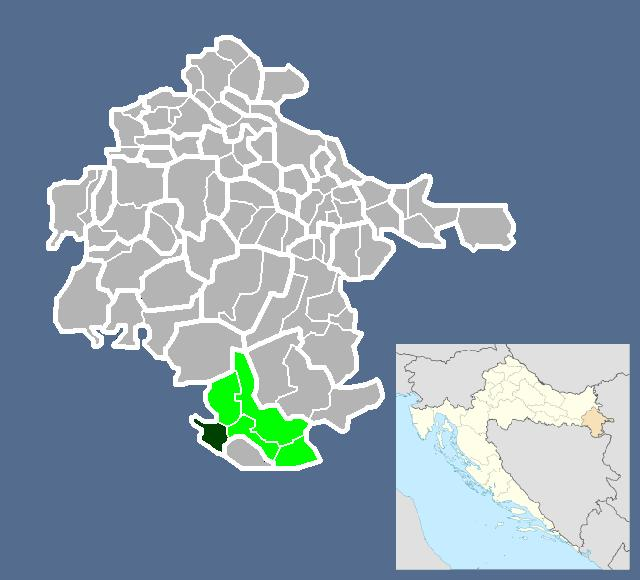 Српски (ћирилица): Вуковарско-сремска жупанија- Рајево Село.